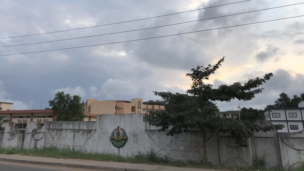 Université d'Abomey-Calavi